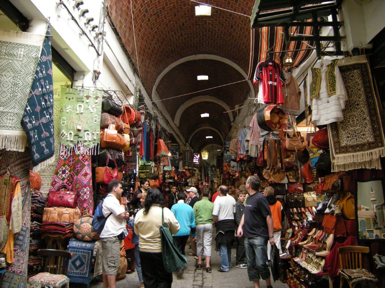 Allée du souk ettourk (souk des turques) dans la médina de Tunis